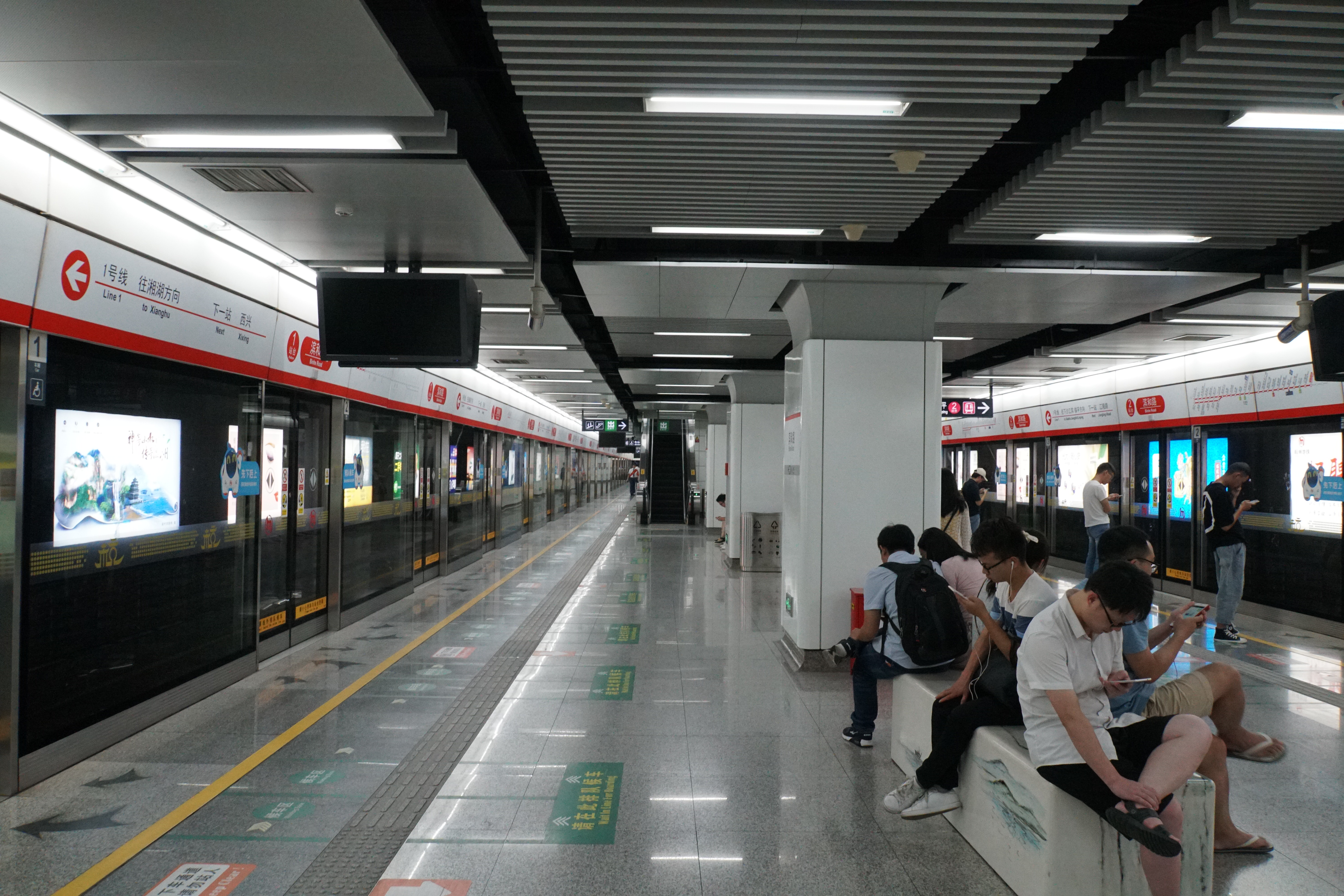 滨和路站站台